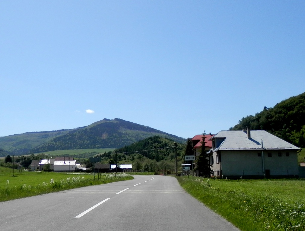 Obec Šambron, okres Stará Ľubovňa.